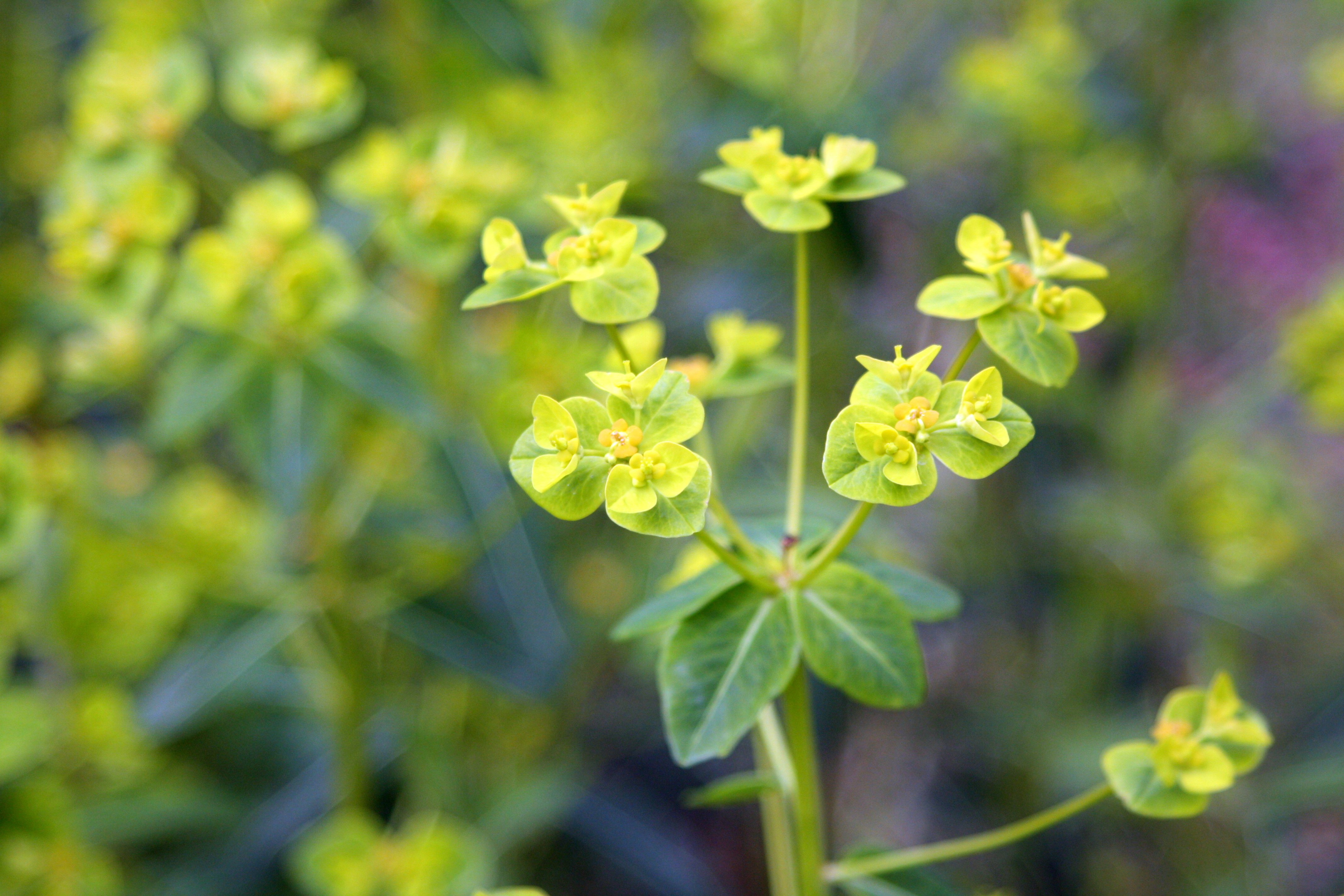 Euphorbia pekinensis